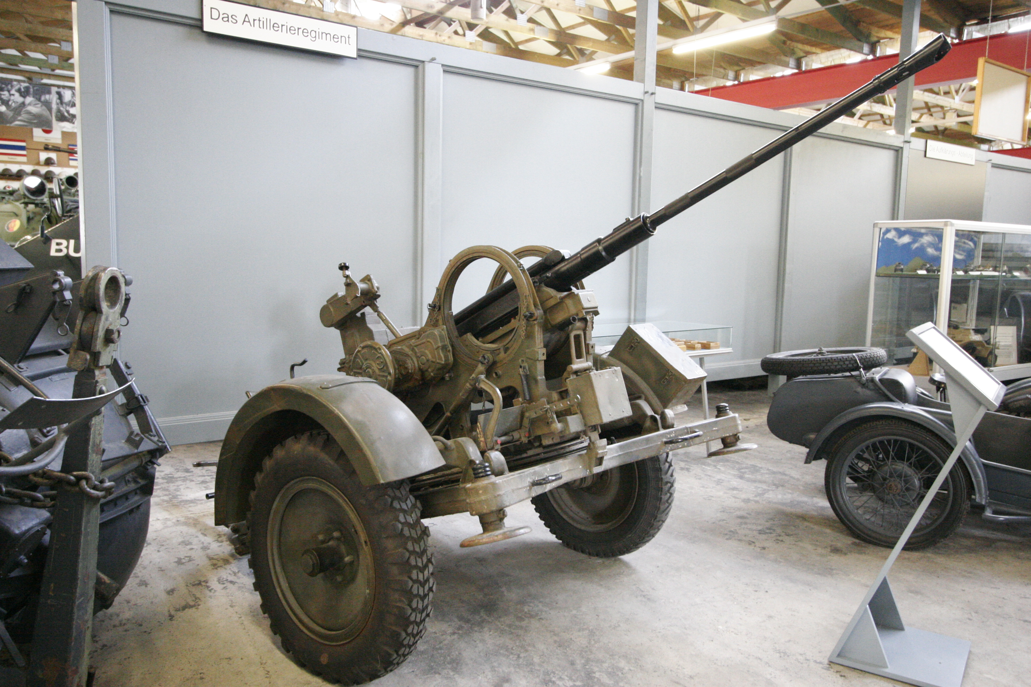 2cm Flak 38 L/65 mit Sonderanhäger 51 on display at the Deutsches Panzermuseum Munster , Germany.